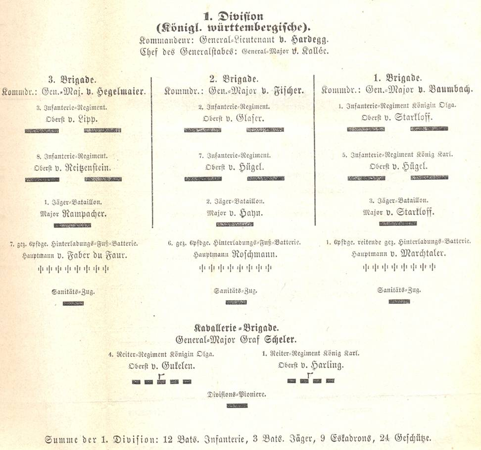 Ordre de bataille der 1. (Königl. württembergische) Division des VIII. Bundes-Armee-Korps im Deutschen Krieg 1866